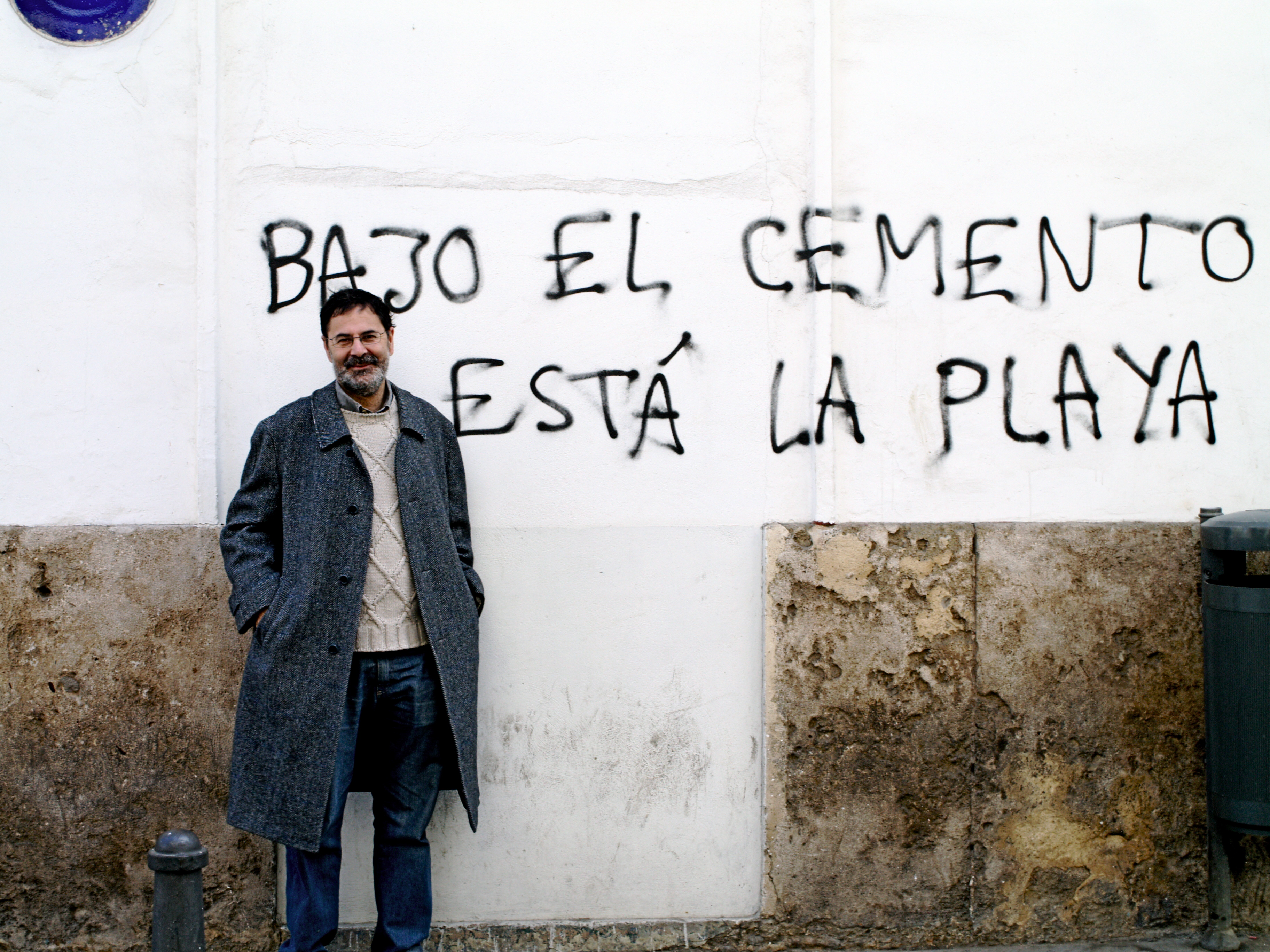 David Hammerstein